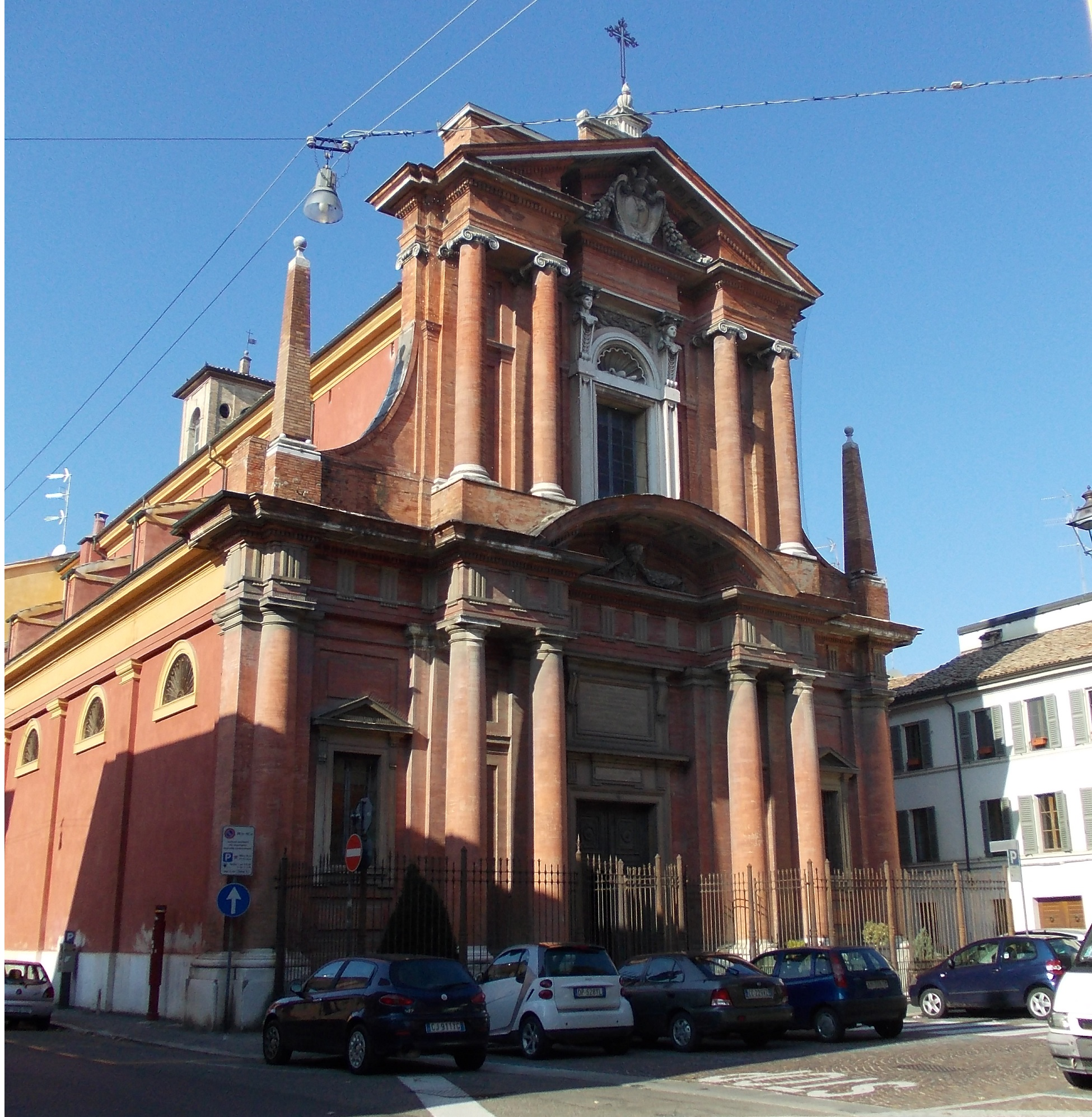 la facciata della chiesa di San Giuseppe a Parma